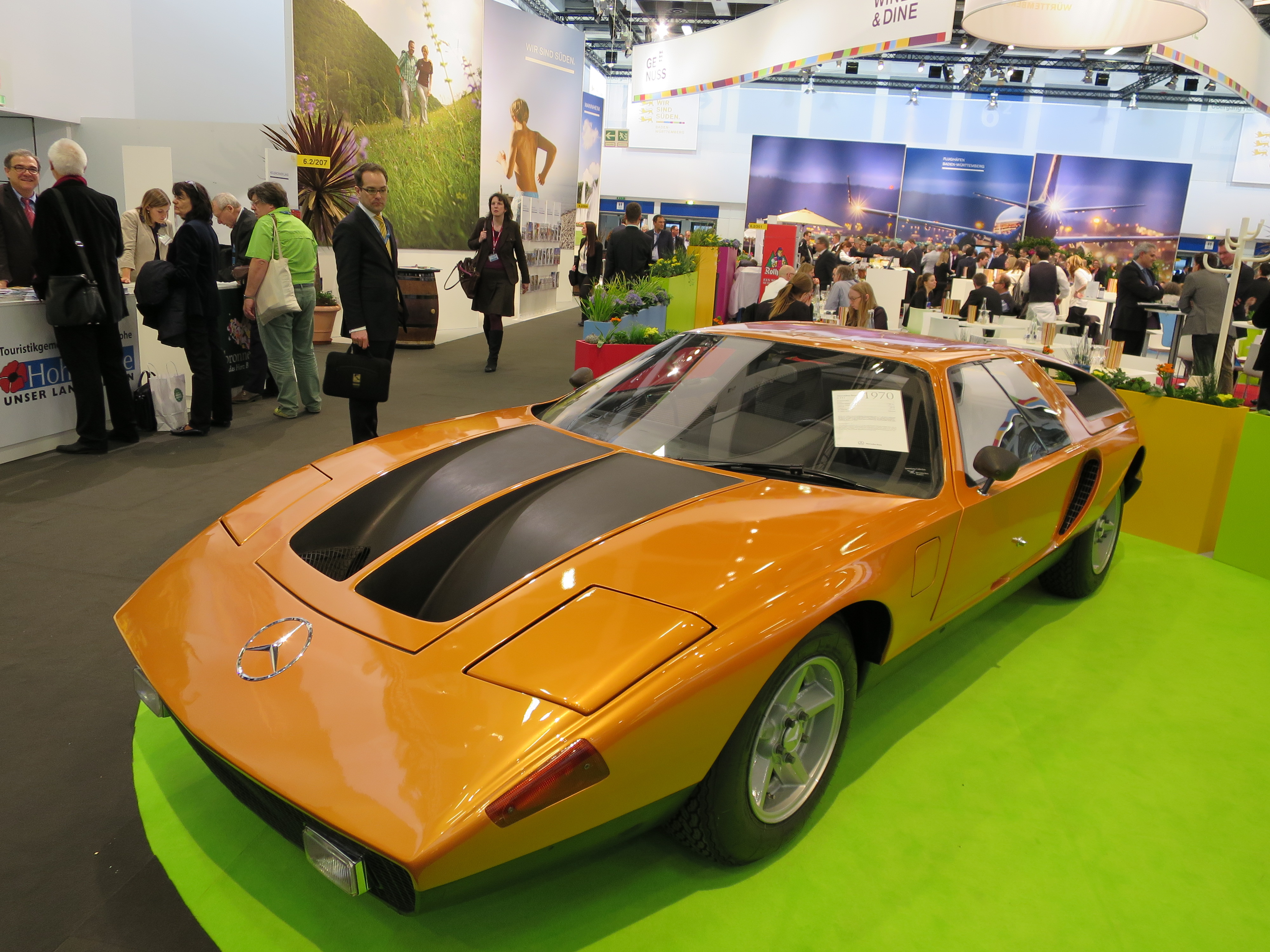 Mercedes-Benz C 111 podczas ITB Berlin 2015